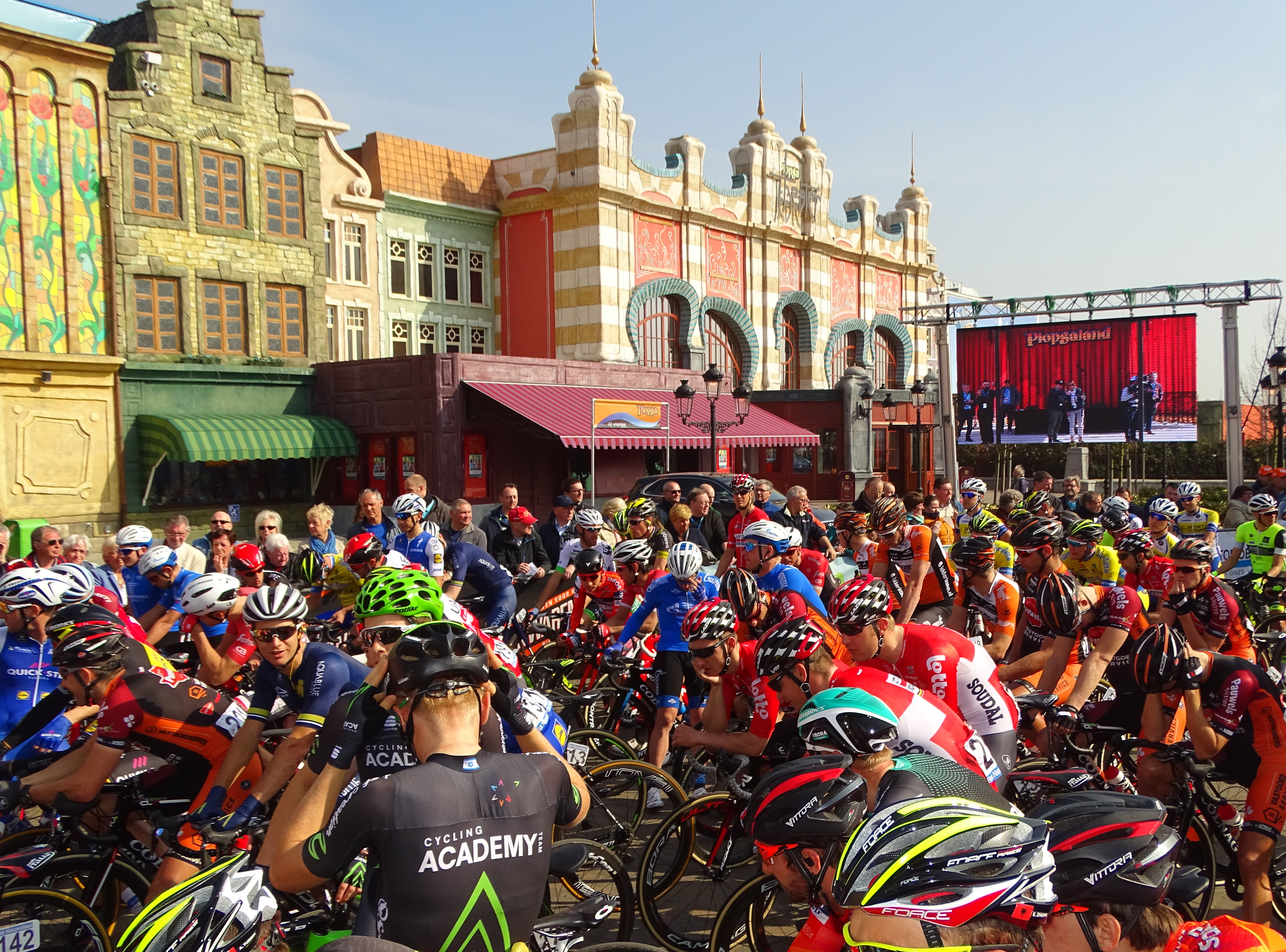 Reportage réalisé le mardi 28 mars à l'occasion de du départ de la première étape des Trois jours de La Panne 2017 à Adinkerque (La Panne), Belgique.